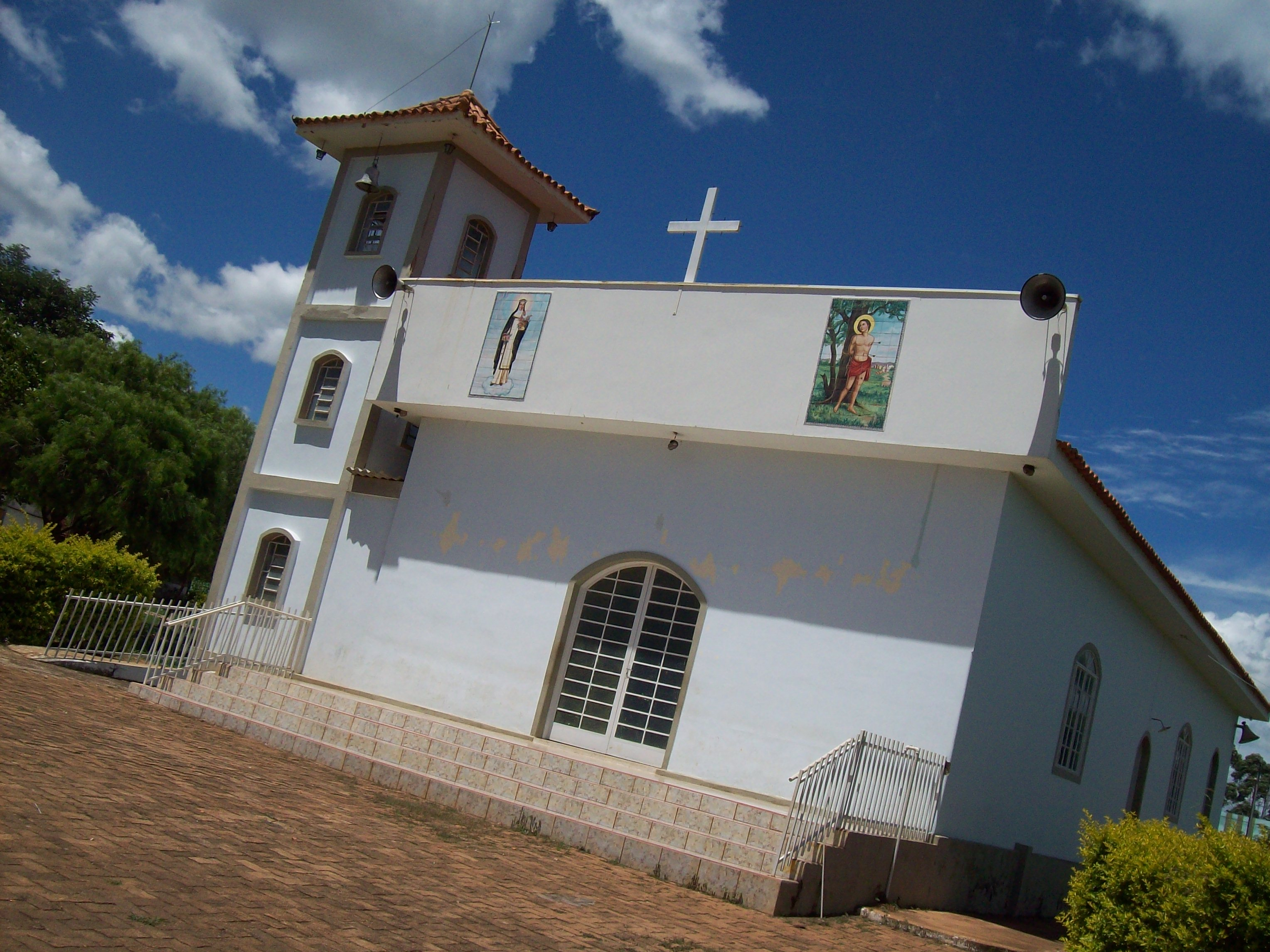 Igreja do Distrito de Santa Rosa dos Dourados.